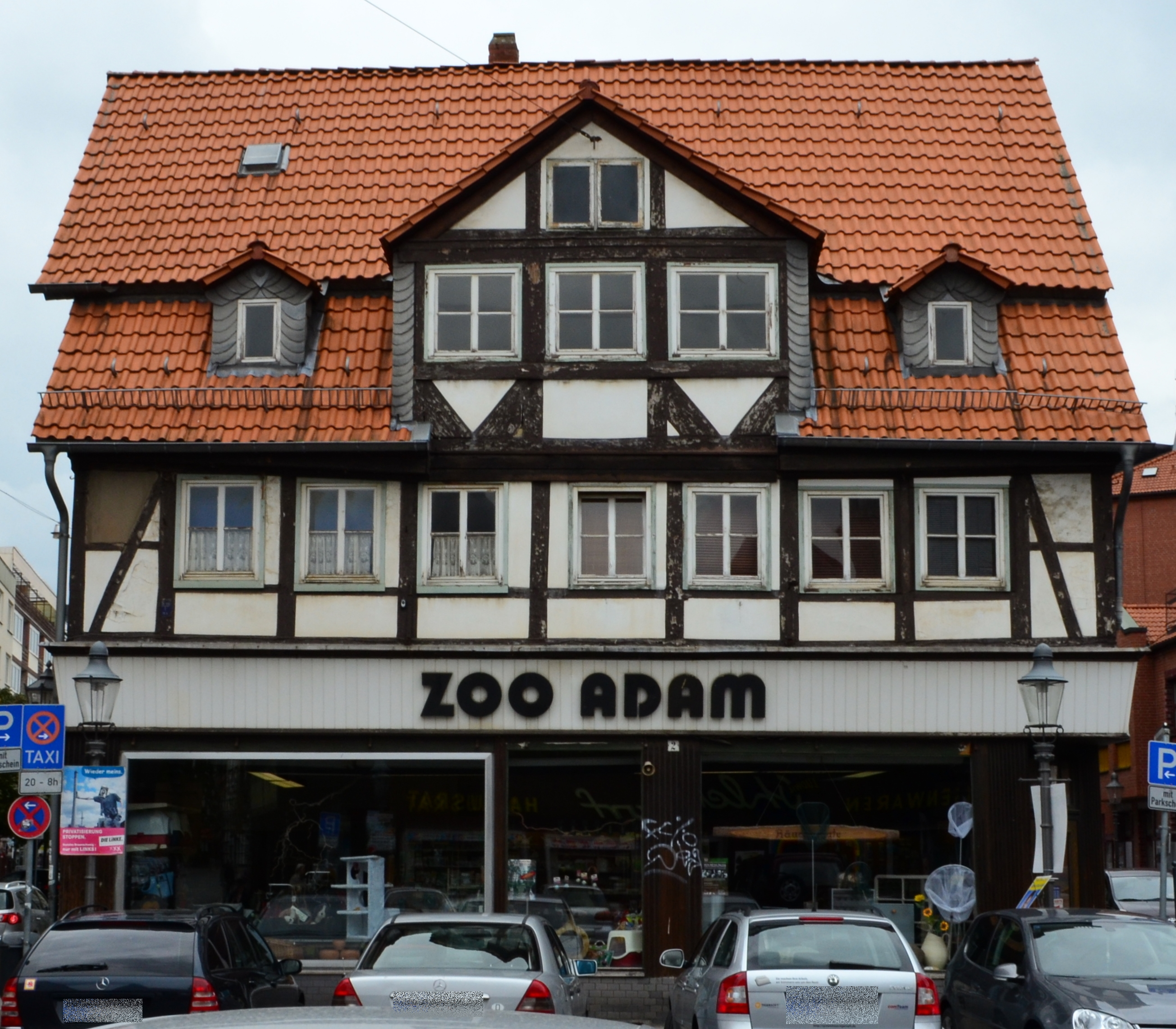 Braunschweig, Ackerhof: Ackerhof 2, Frontansicht 2011. Ältestes datiertes (1432) Fachwerkhaus in Deutschland?